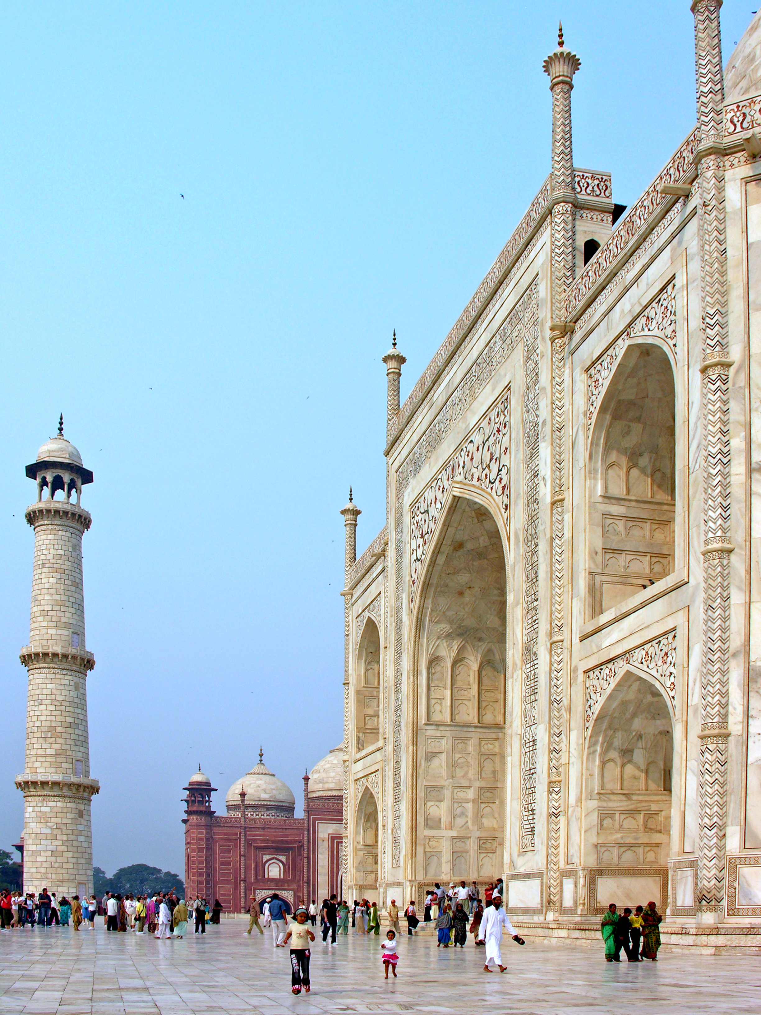 India-6173